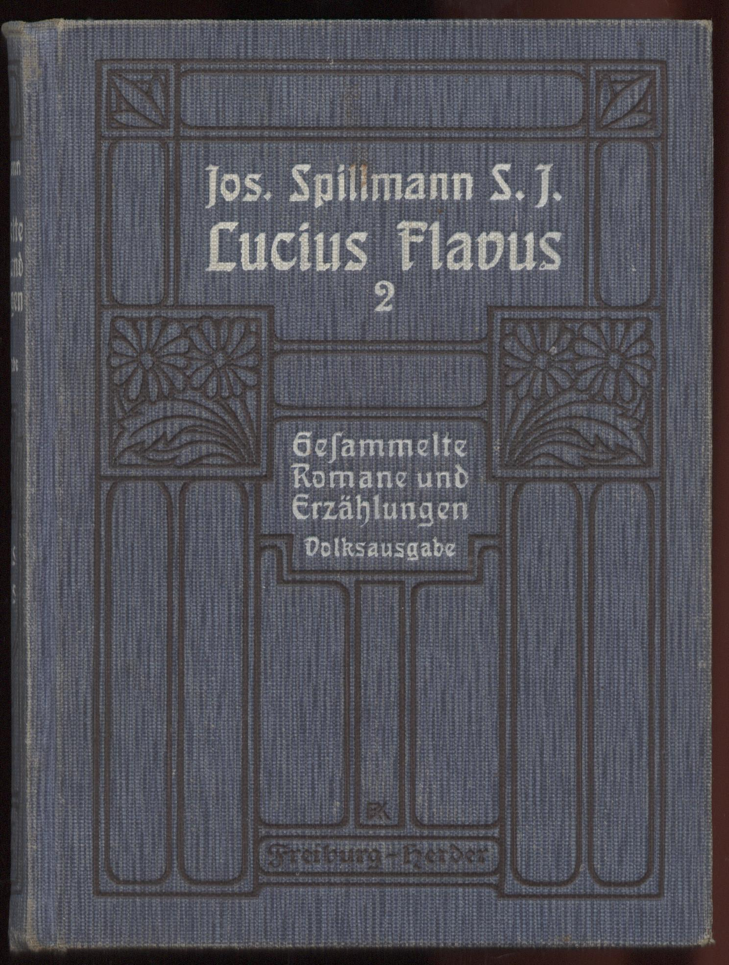 Joseph Spillmann S.J., Bucheinband, Jugendstil